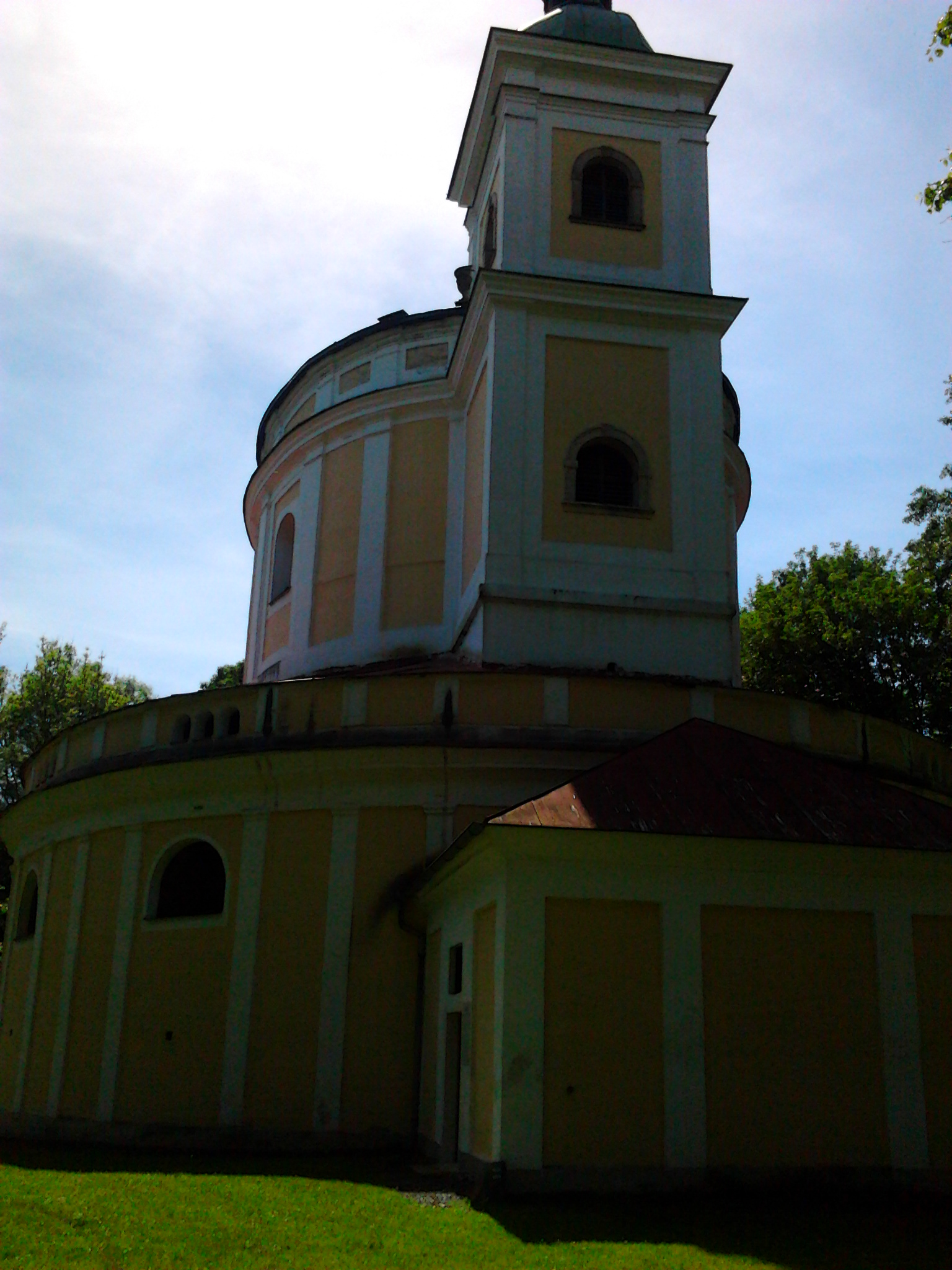 Kostel sv. Anny (Hájek), návrší SV od vsi, Hájek